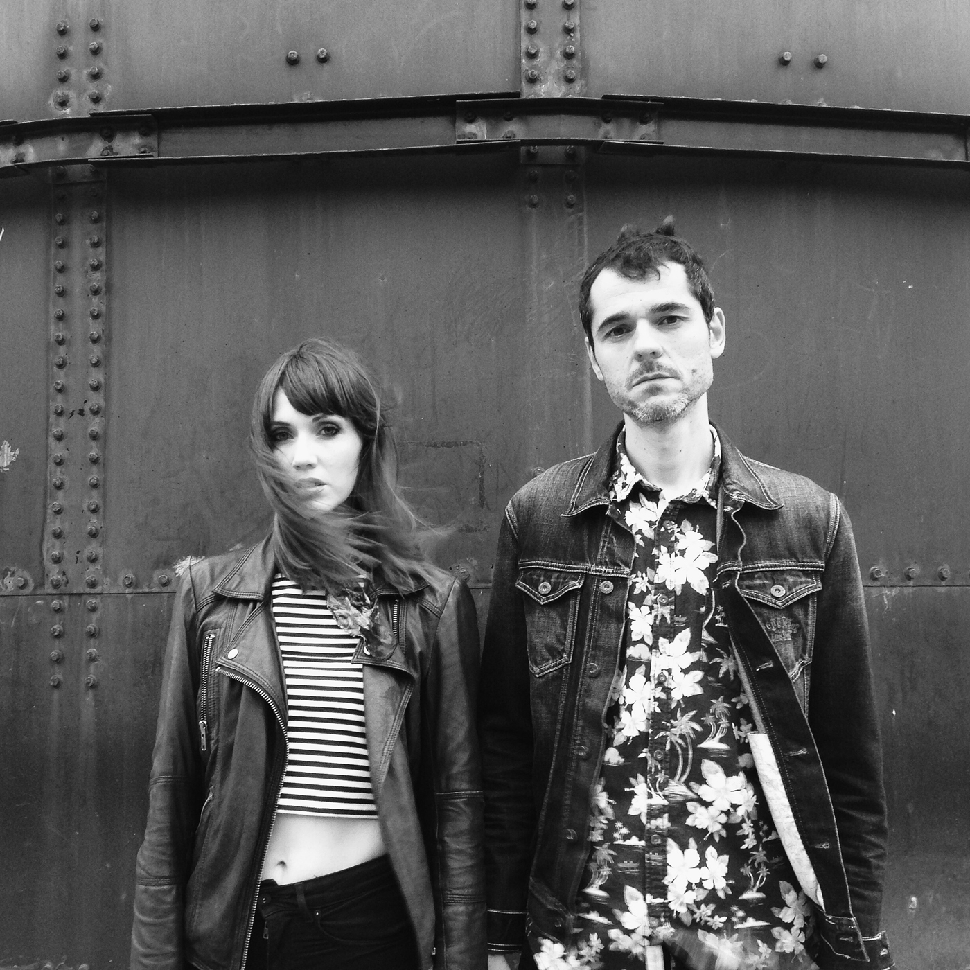 The Bright - Miryam Gutiérrez y Aníbal Sánchez